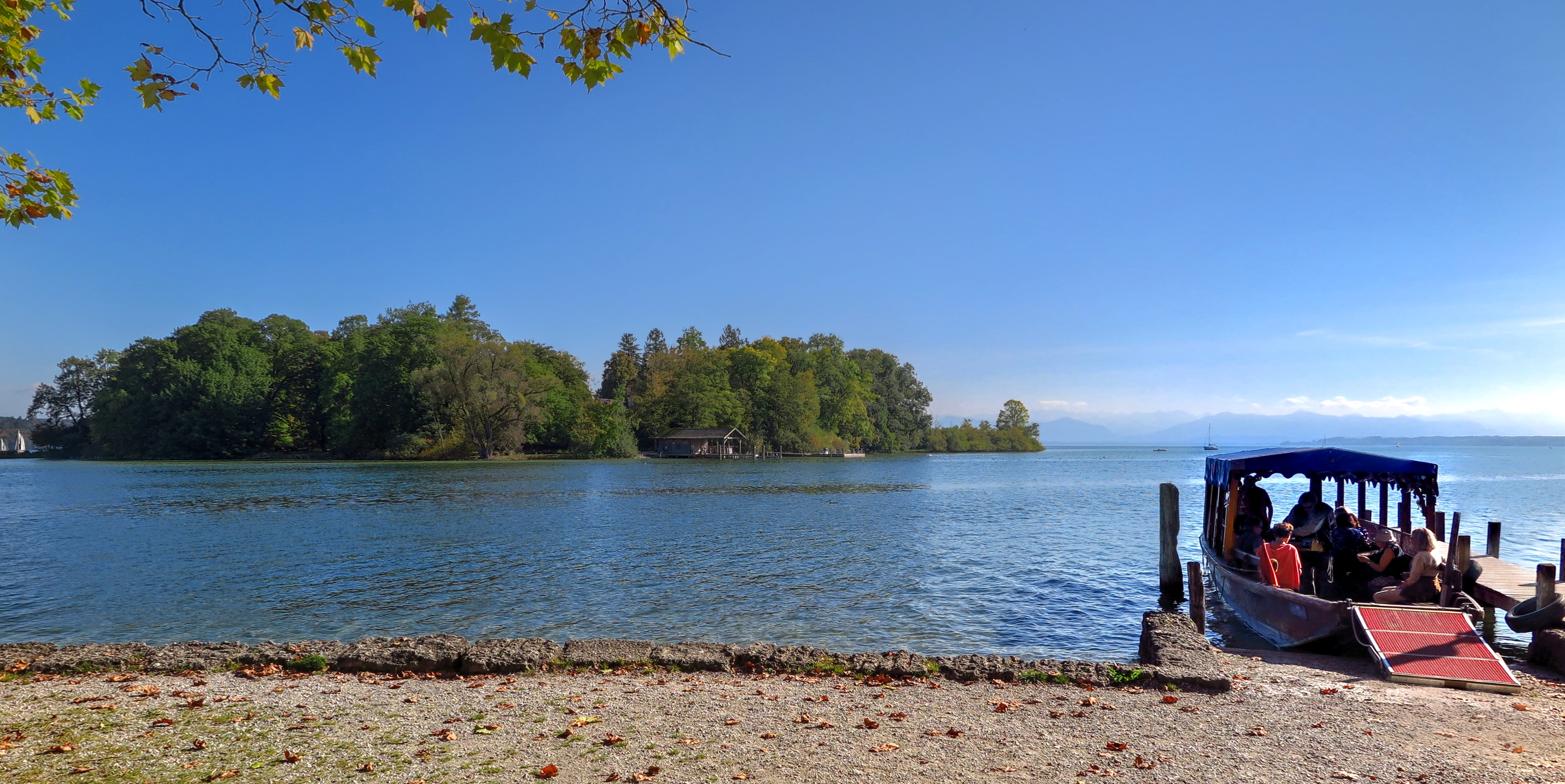 Deutschland, Bayern, Oberbayern, Landkreis Starnberg, Feldafing, Ablegestelle der Fähre zu Roseninsel